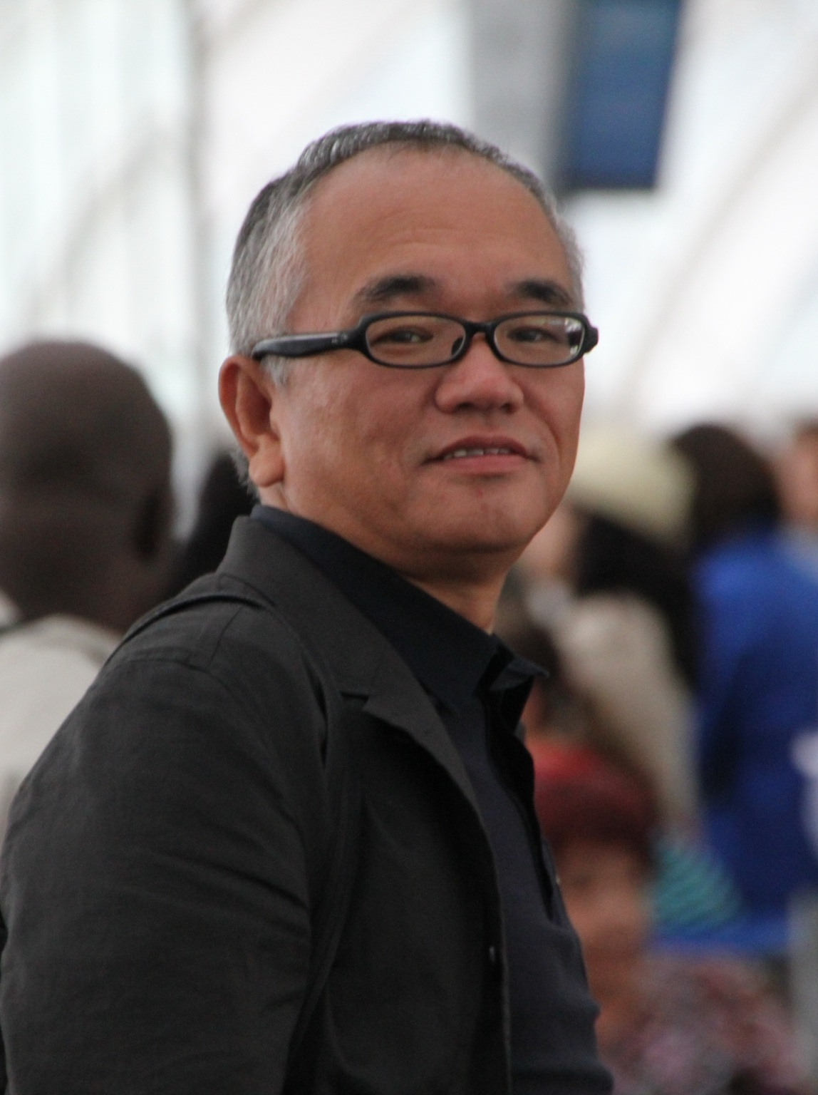 CDG Airport at Paris